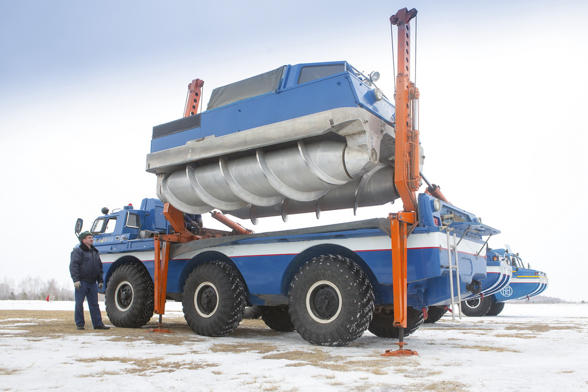 Учение поисково-спасательного отряда Центрального военного округа по обнаружению и эвакуации экипажа космического корабля «Союз ТМА» (Челябинской область)